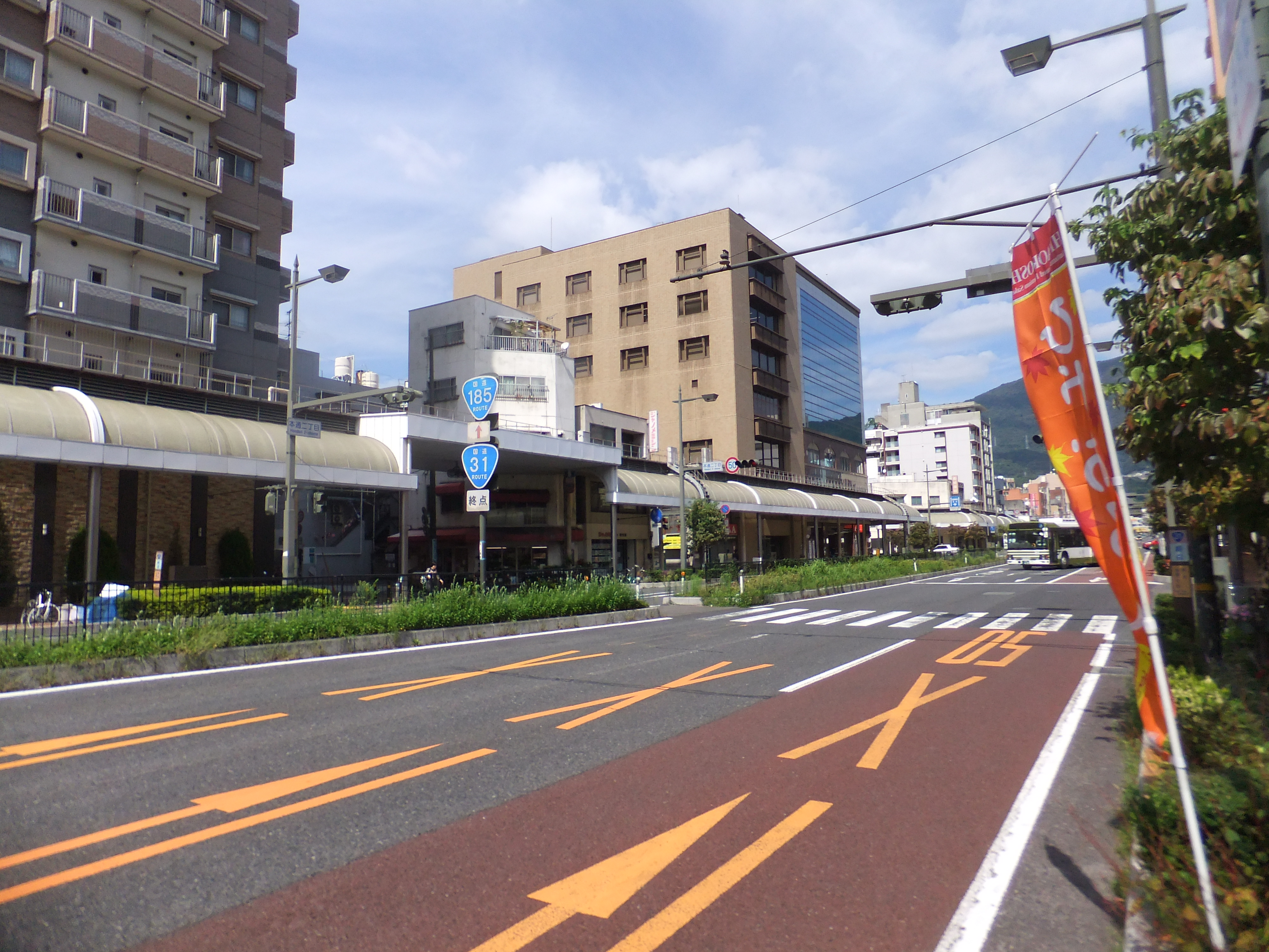 国道31・185号始点・終点